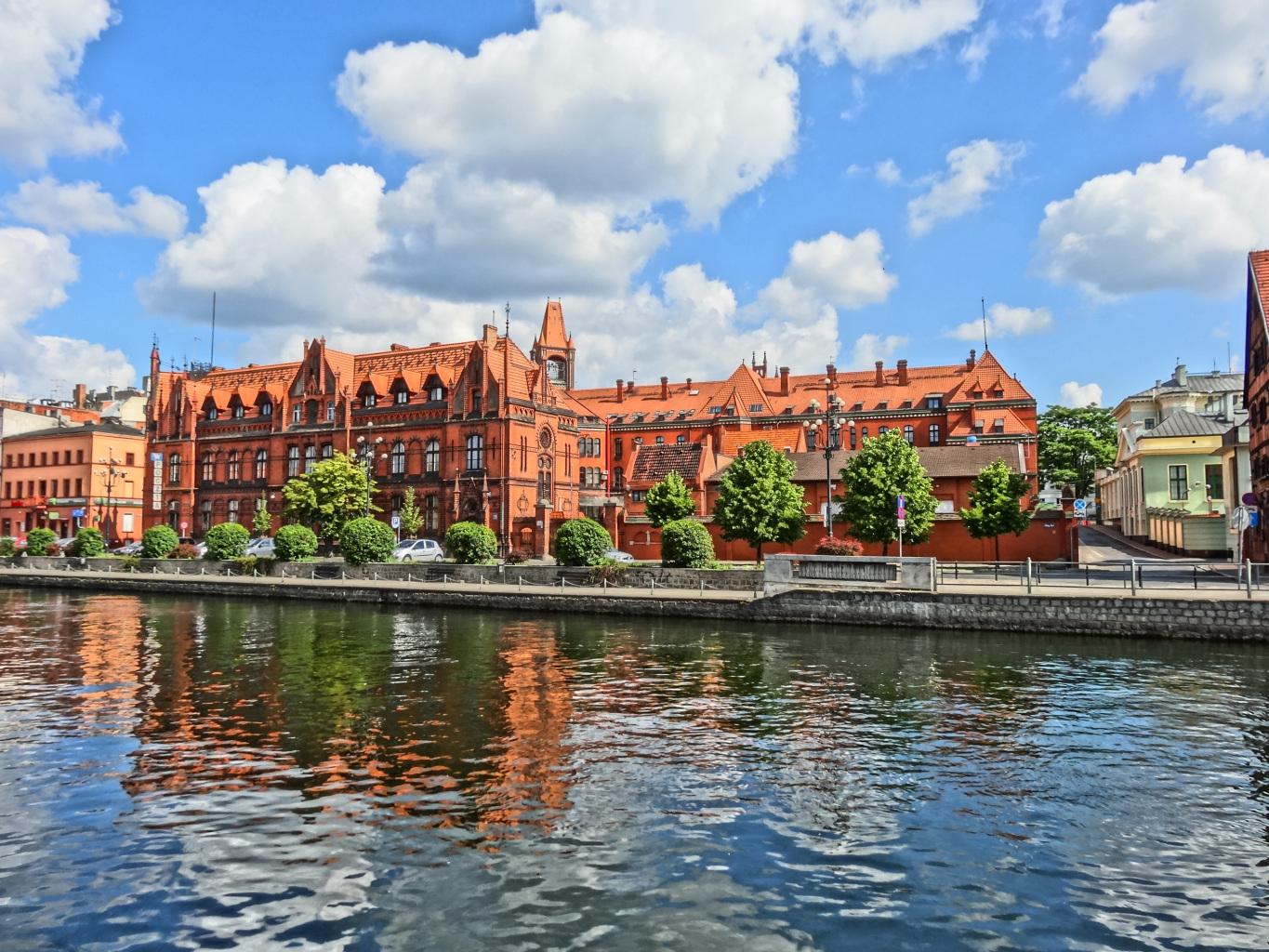 Budynek Poczty Głównej w Bydgoszczy przy ul. Jagiellońskiej (zbud. 1883 skrzydło płd, 1899 skrzydło płn)